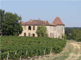 Château de Mauhic